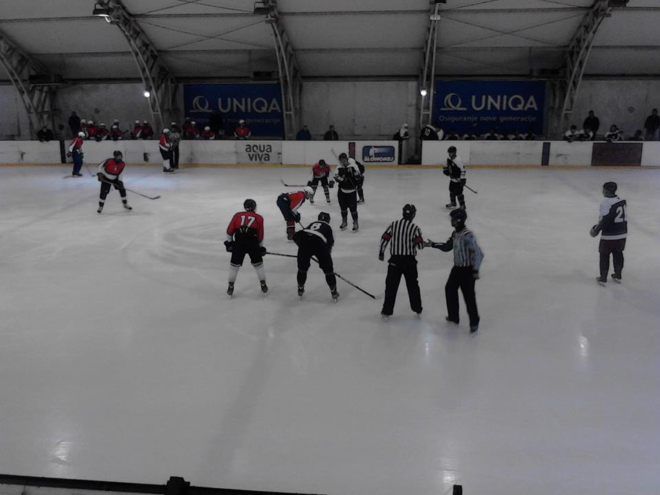 Srpski (latinica): Prvo kolo Hokejaške lige Srbije između Srbije U20 i Partizana